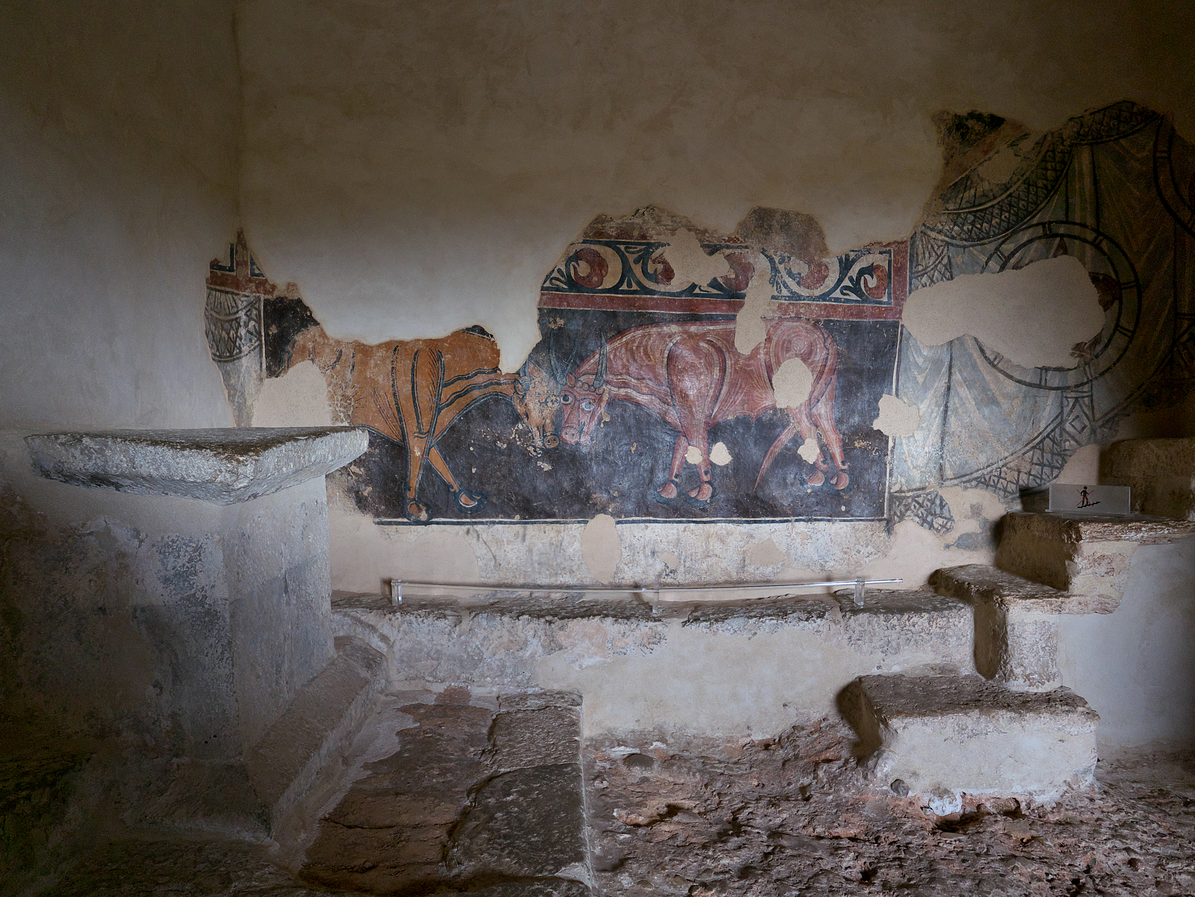 Muro meridional de la iglesia. El buey simbolizaba la generosidad, en sentido amplio. Mantienen la cabeza baja y el hecho de su encaramiento es de difícil interpretación.